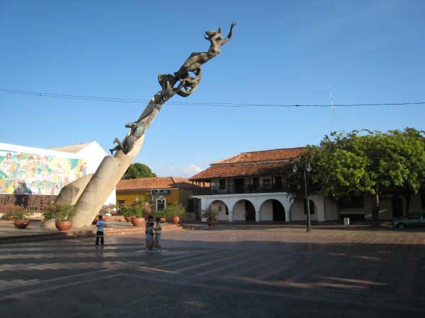 Image of Revolucion en Marcha monument Valledupar, Colombia Monumento "La Revolución En Marcha" de Rodrigo Arenas Betancur. al fondo Casa Colonial de la familia Maestre Pavajeau. La revolución en marcha, fue el nombre de un programa de gobierno político del doctor Alfonso López Pumarejo, en donde se reconoció por primera vez en la historia las garantías y los derechos sociales a los trabajadores y a la mujer. Fue concebida por el maestro Rodrigo Arenas Betancur, gracias al encargo que le hizo la gobernadora Paulina Mejía de Castro Monsalvo, en homenaje a uno de los vallenatos y colombianos más querido como lo fue el doctor López Pumarejo , localizada en la Plaza Alfonso López con calle 16 y carrera 5.